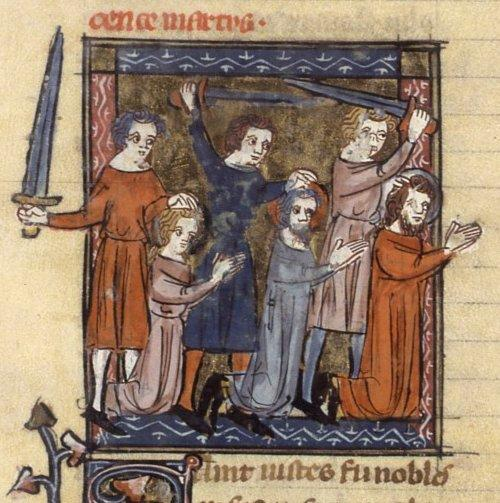 Martyre de saint Vit et de saint Modeste (Martyrdom of Vitus, Modestus, Crescentia)